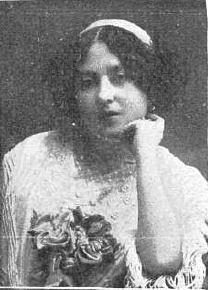 Fotografía de la escritora española Concha Espina publicada en 1914 con motivo de la aparición de su libro La esfinge maragata